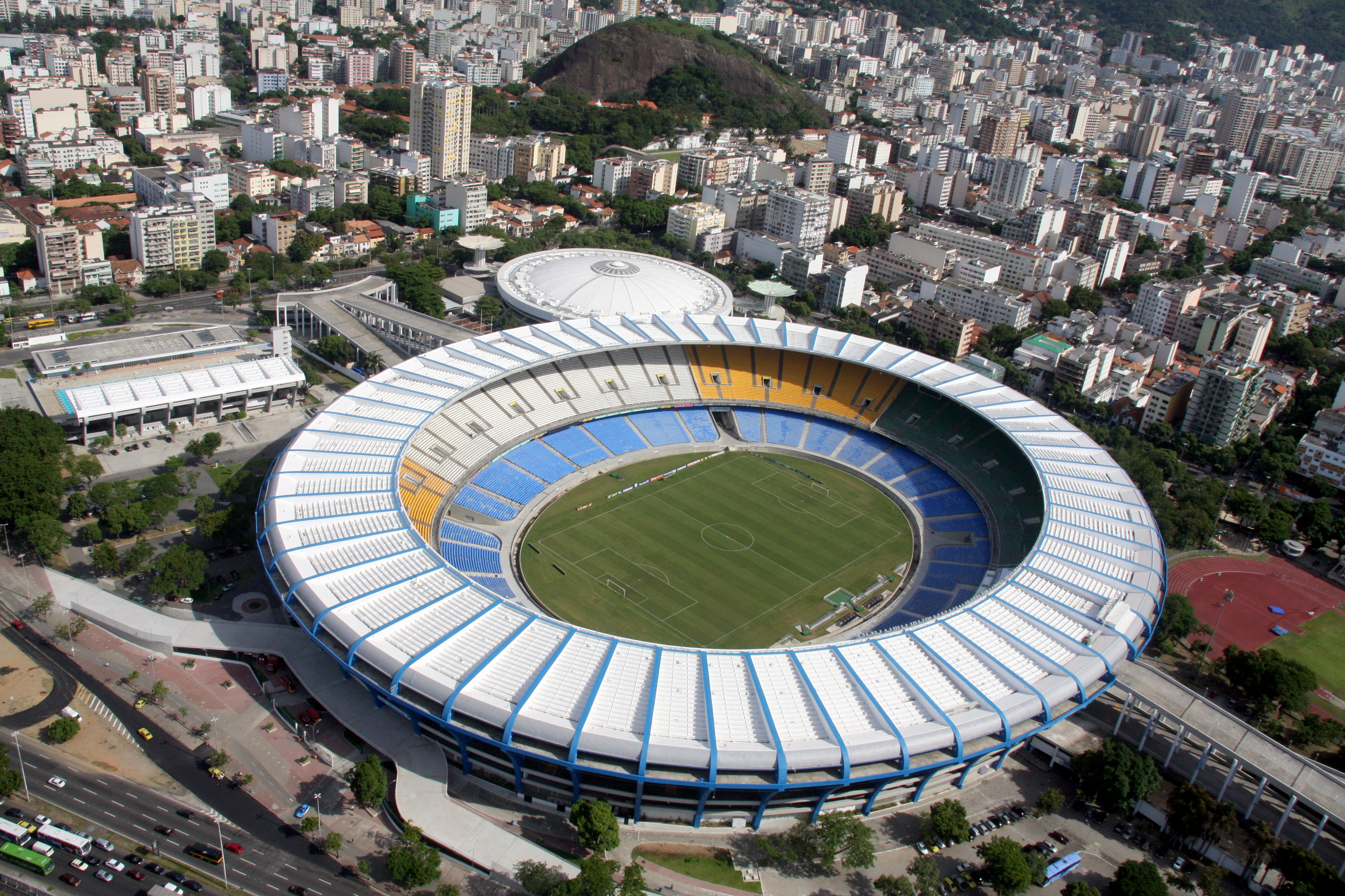 214.JPG